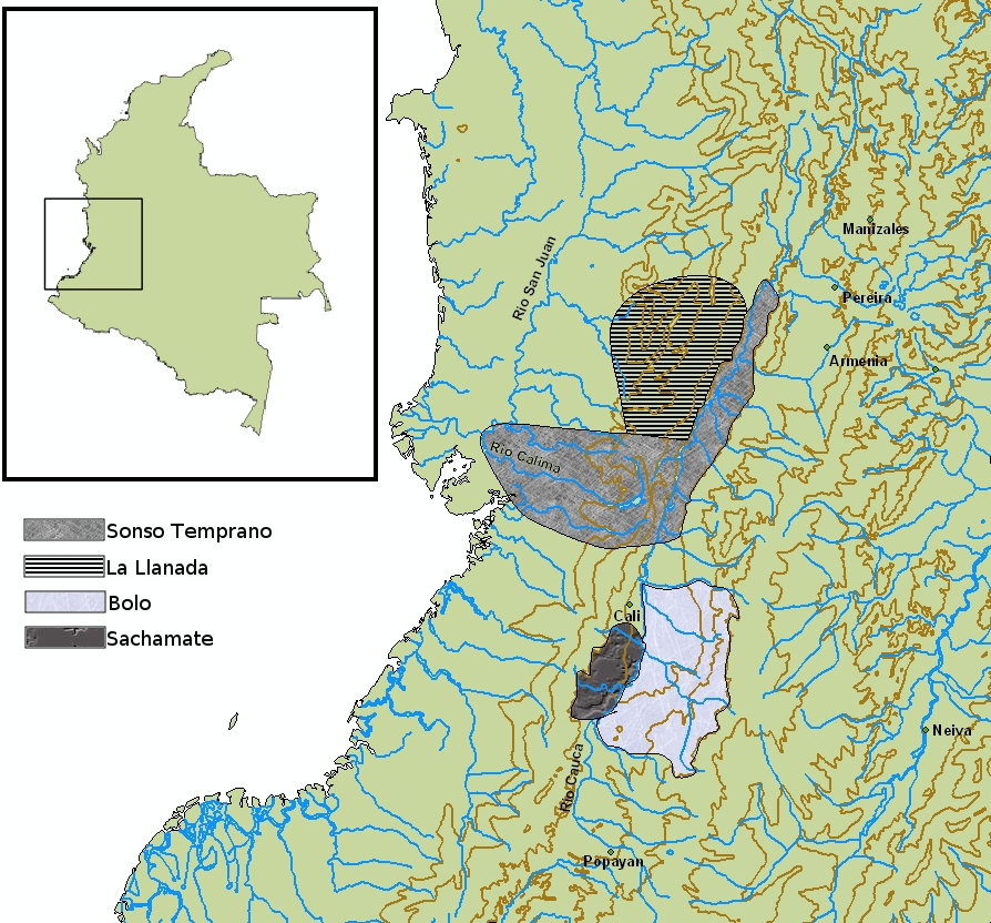 Tardio I, Valle del Cauca, Colombia